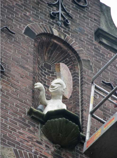 Nieuw beeldje in de nis van Vredenburgh sinds september 2011. Kraker met hanenkam. Kunstenaar: Joris Baudoin